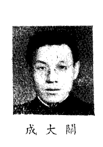 中文（中国大陆）: 制憲國民大會代表